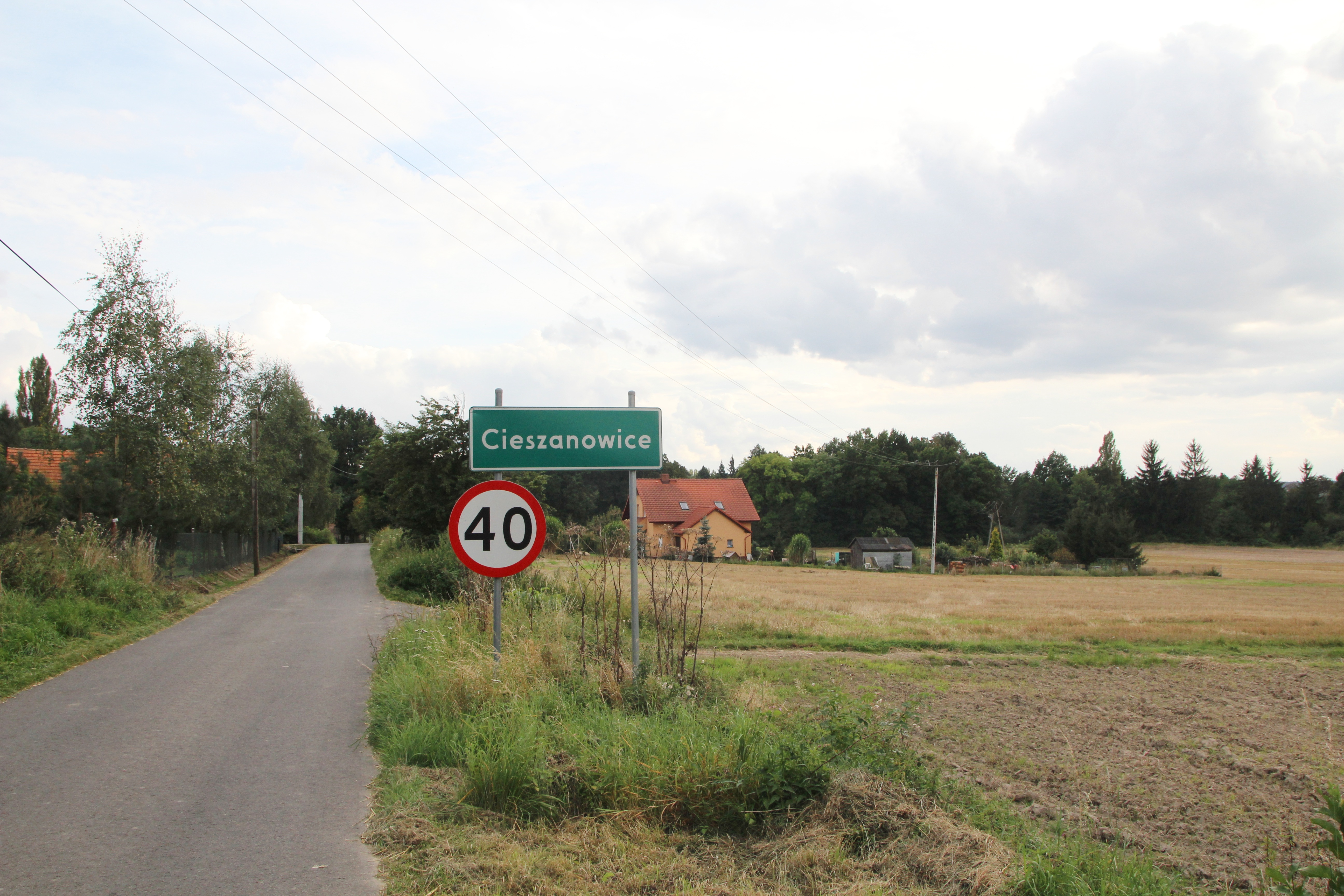 Cieszanowice – wieś w Polsce położona w województwie opolskim, w powiecie nyskim, w gminie Kamiennik.